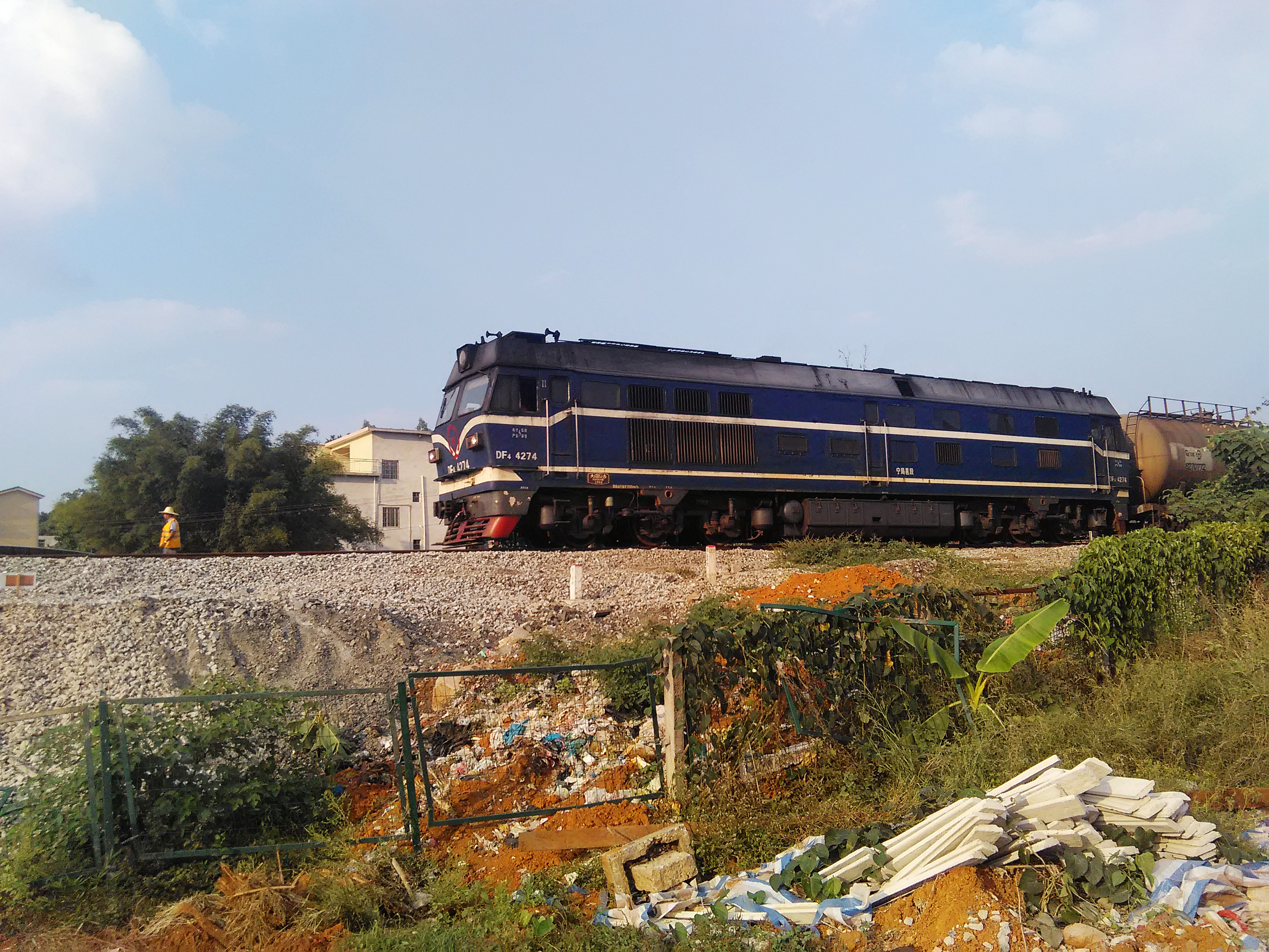 南宁机务段4274号东风4C型内燃机车牵引货列进入柳州市雒容站。